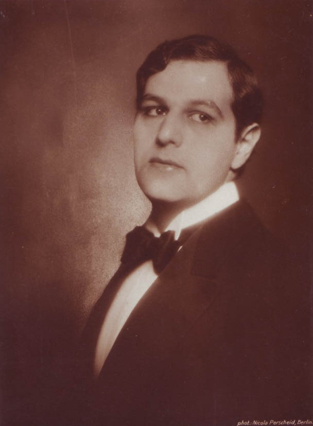 Porträt des deutschen Schauspielers Fritz Delius